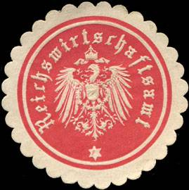 Sealing stamp Title: Reichswirtschaftsamt Description: rot, weiß, geprägt Place: size: 4 cm